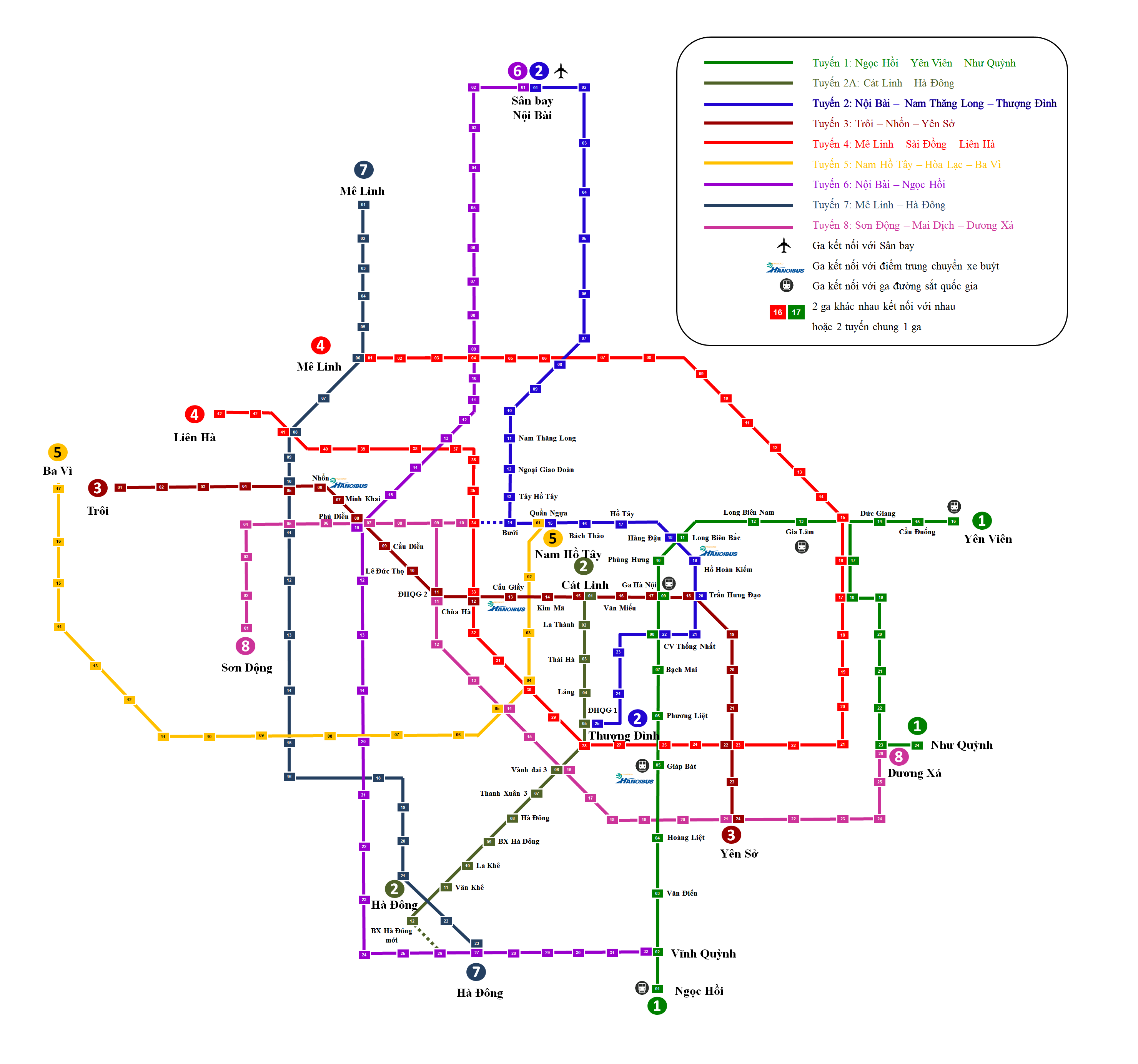 Sơ đồ các tuyến tàu điện của Hà Nội - Việt Nam đã được quy hoạch đến năm 2063 bao gồm chi tiết các nhà ga đã được xác định và các nhà ga chưa được đặt tên.